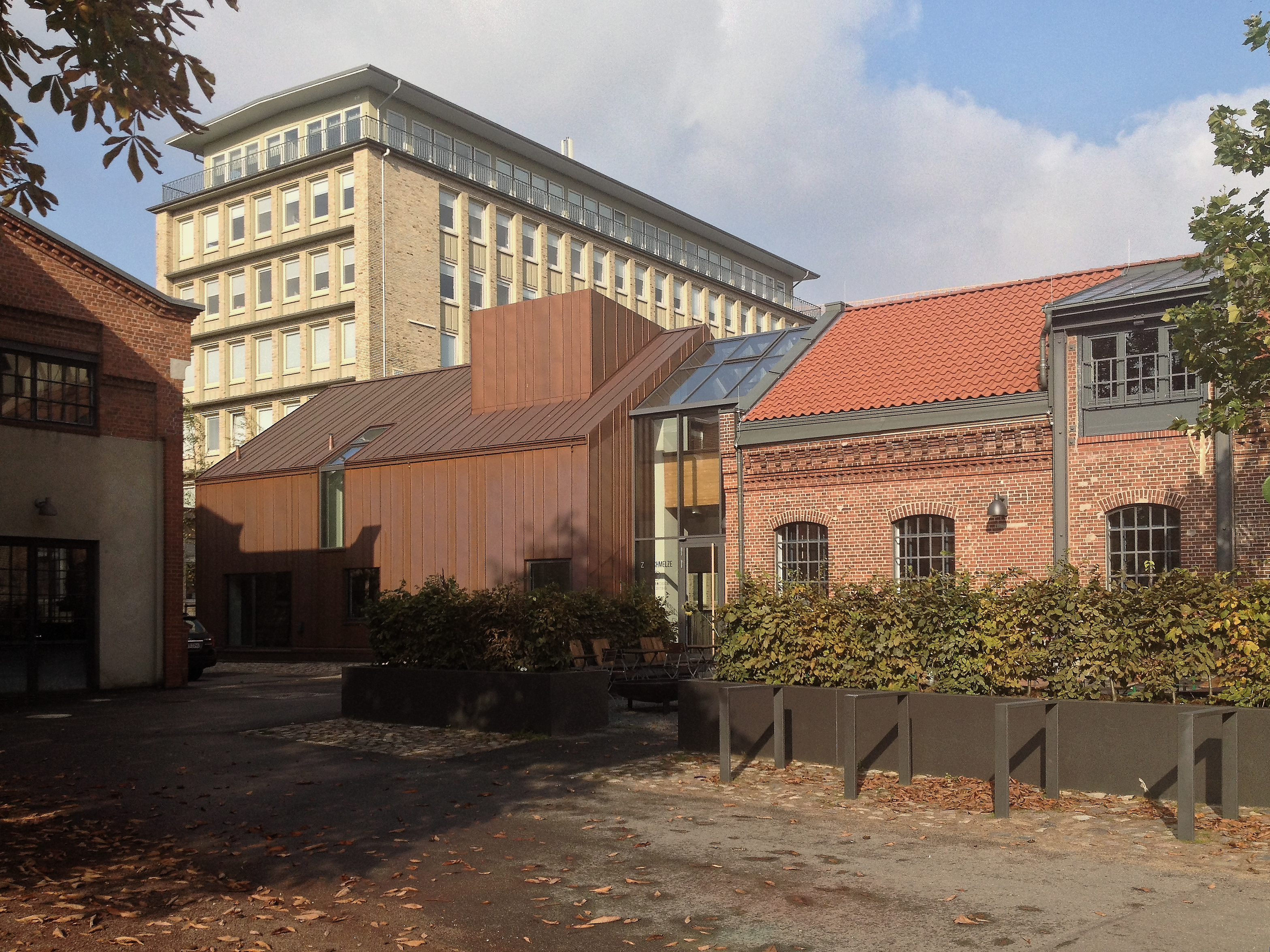 Hamburg-Barmbek-Süd, ehemalige Zinnschmelze auf dem Gelände des Museums für Arbeit nach dem Anbau. Zustand 2015, Ansicht des Anbaus von Süden